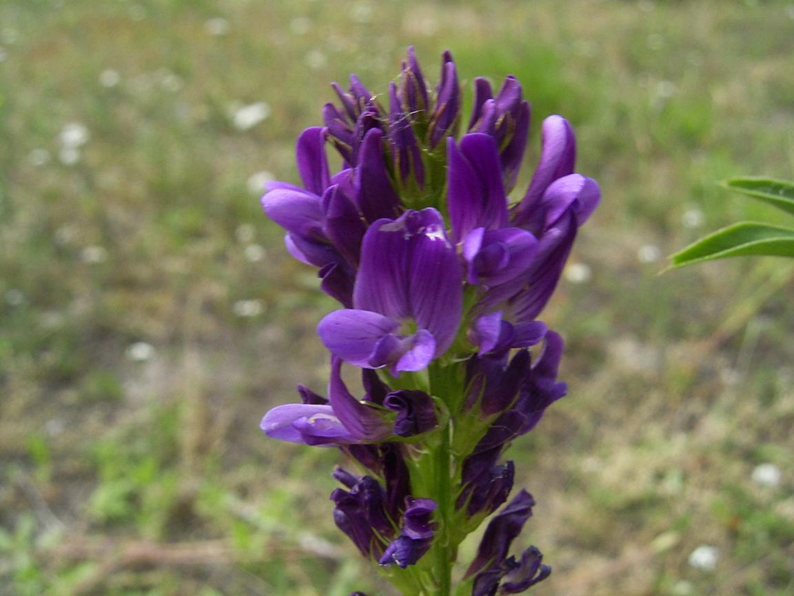 Gouda, bedrijventerrein Goudse Poort, juni 2004